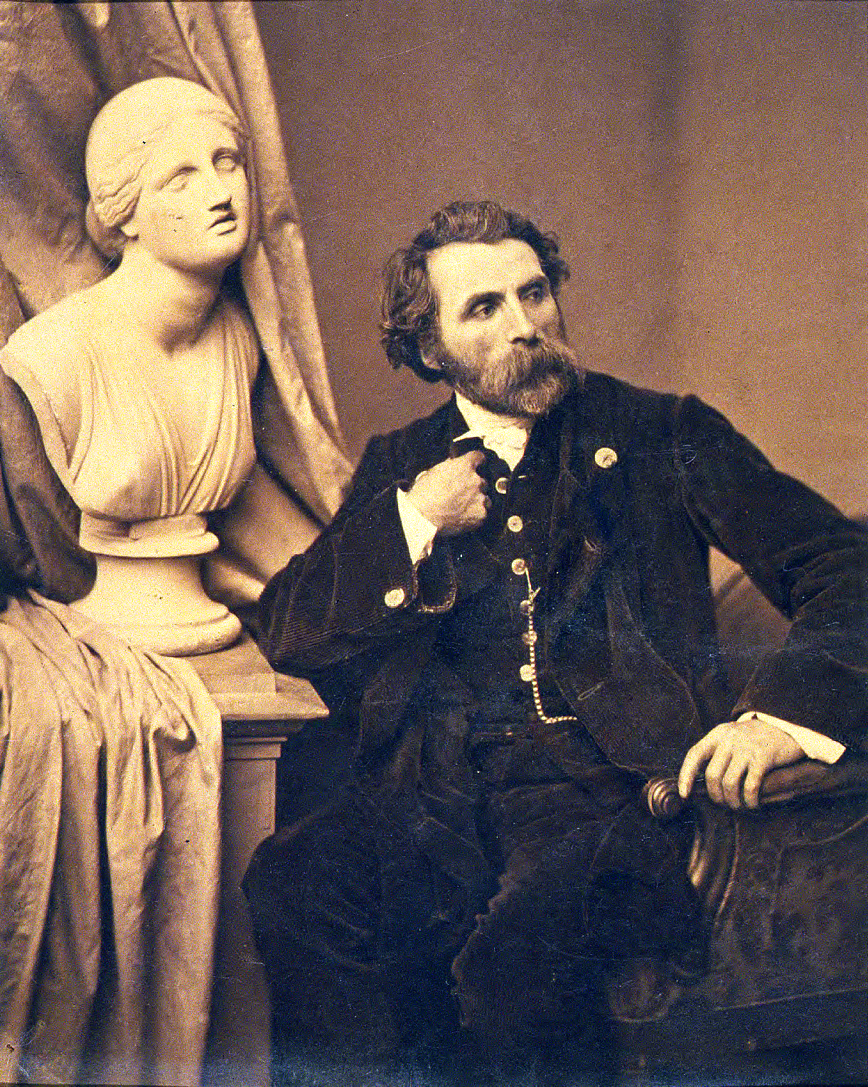 Self-portrait